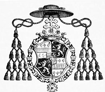 Verzameling van graf- en gedenkschriften van de provincie Antwerpen